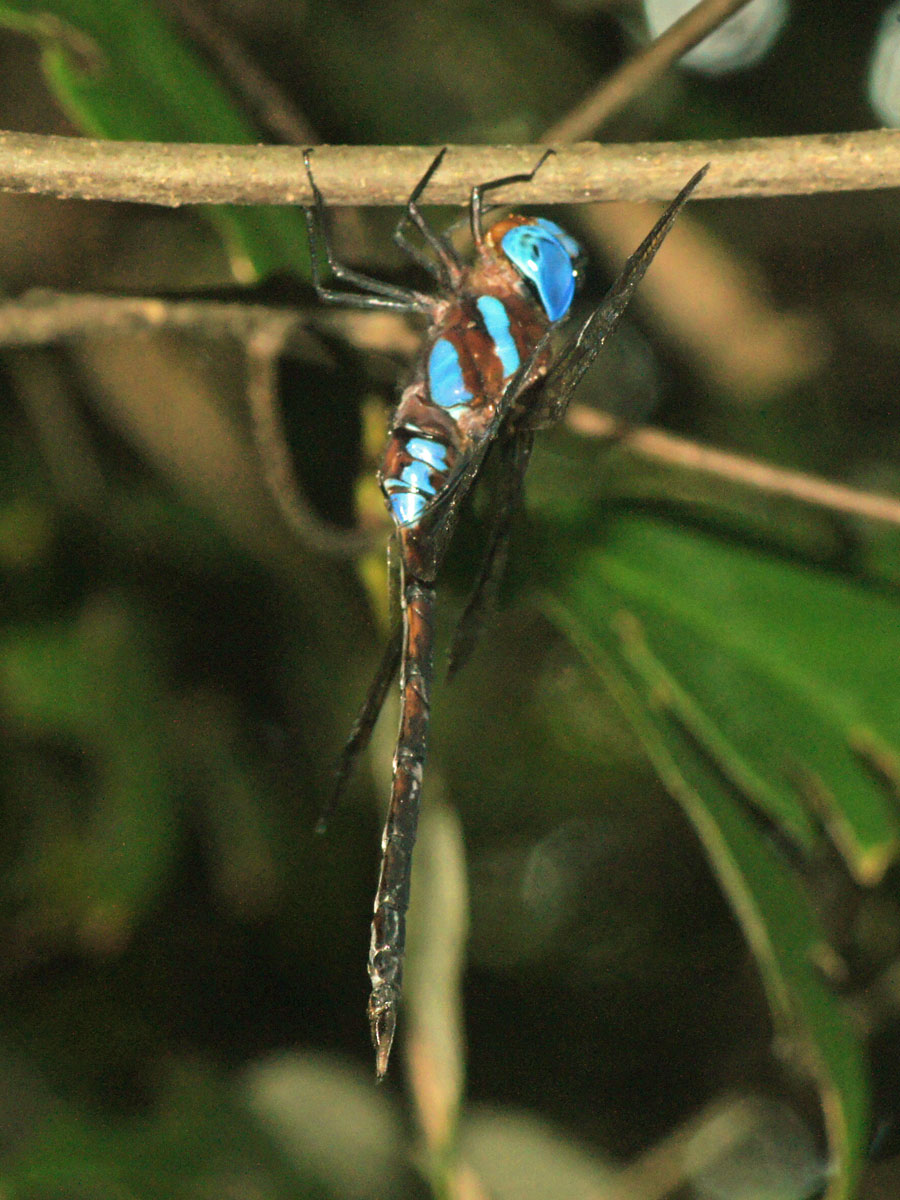 昼間時に枝に留まっているマルタンヤンマ